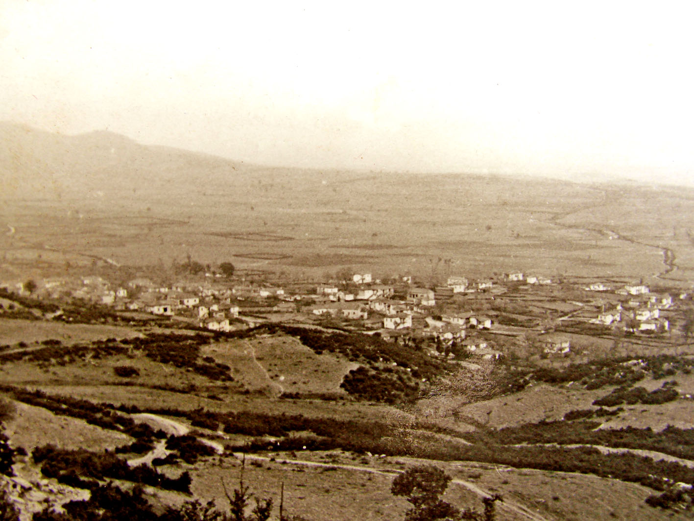 Τα Σανά του 1955